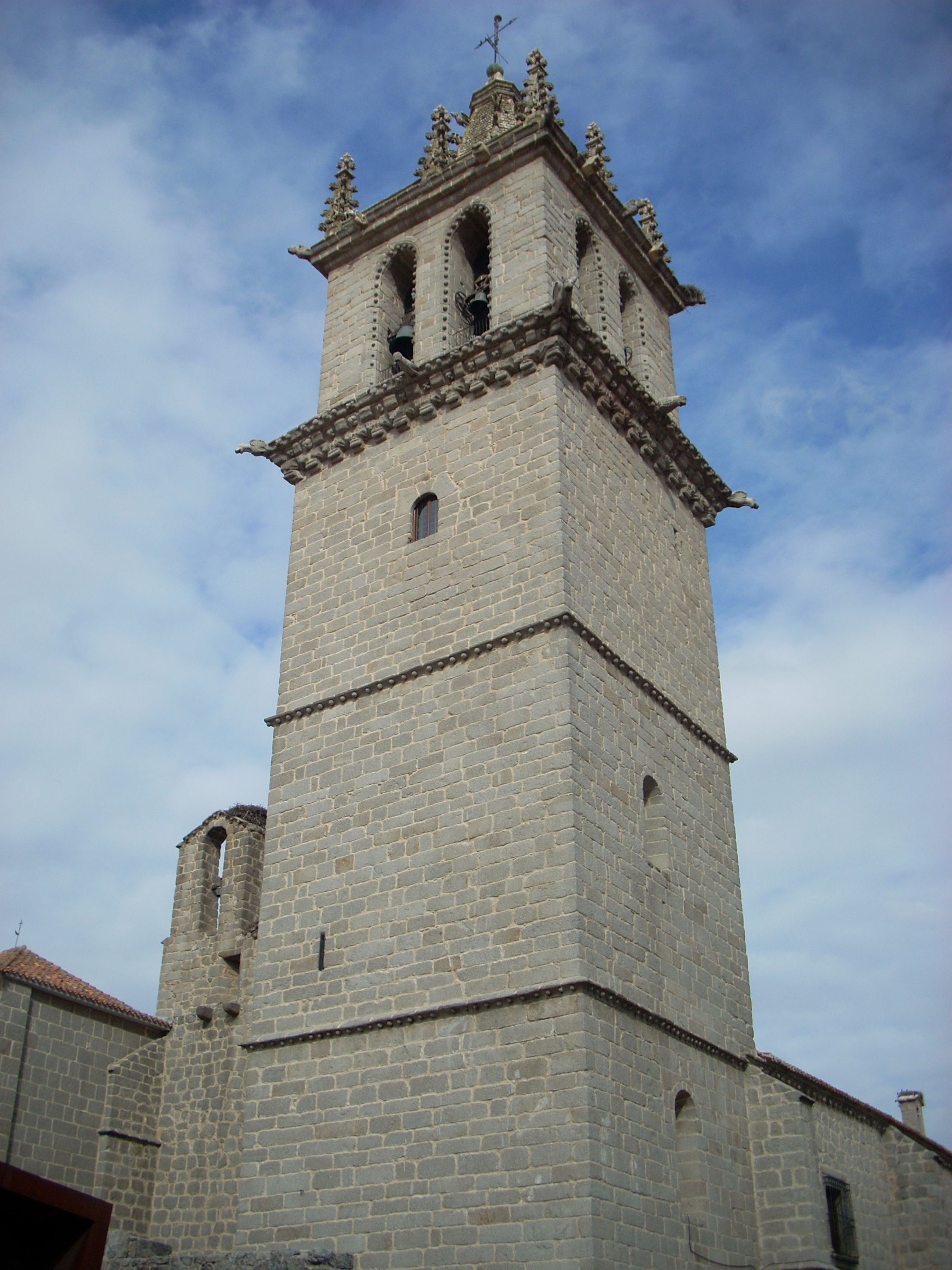 Basilica di Colmenar Viejo, Madrid, Spagna